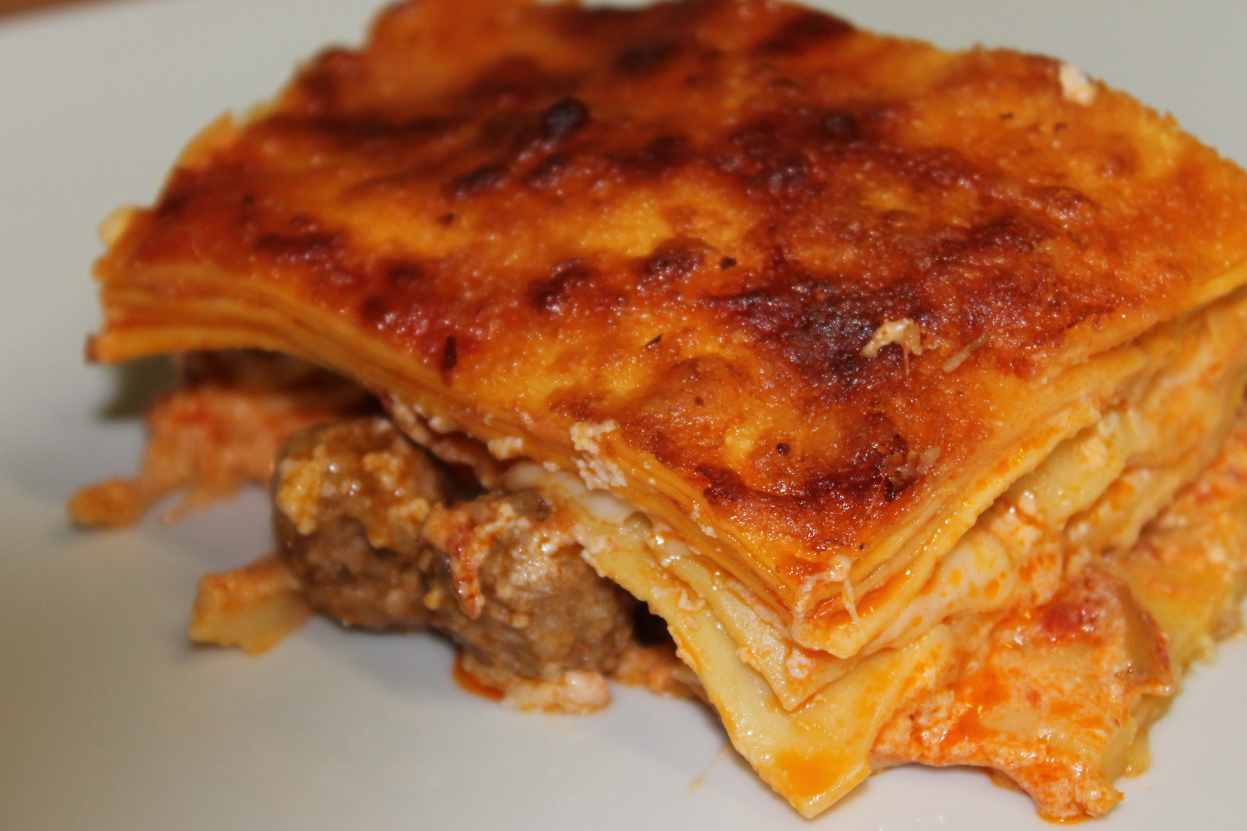 Lasagna al forno classica napoletana